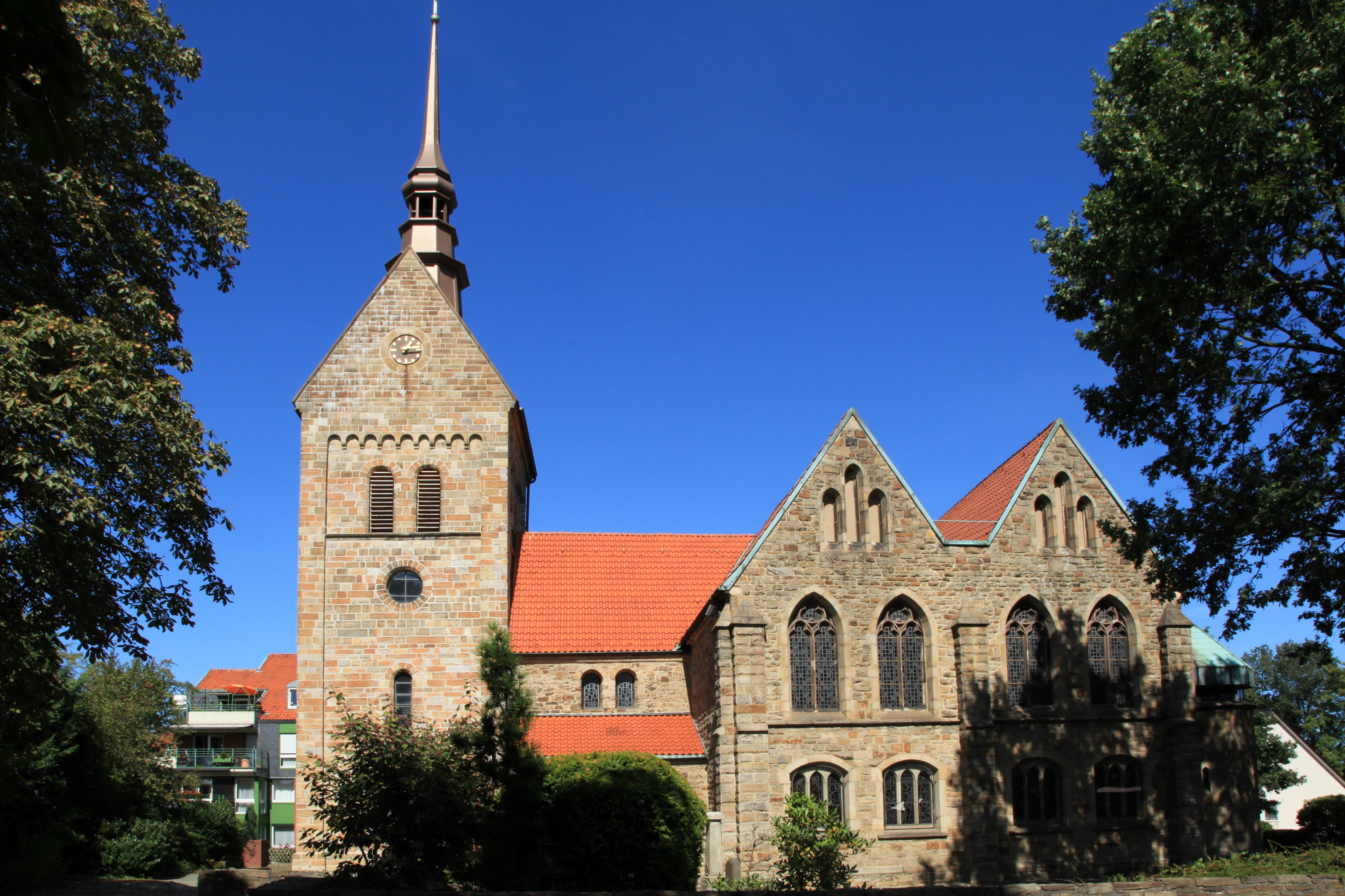 St. Vinzentius, Kattenstraße in Bochum-Harpen